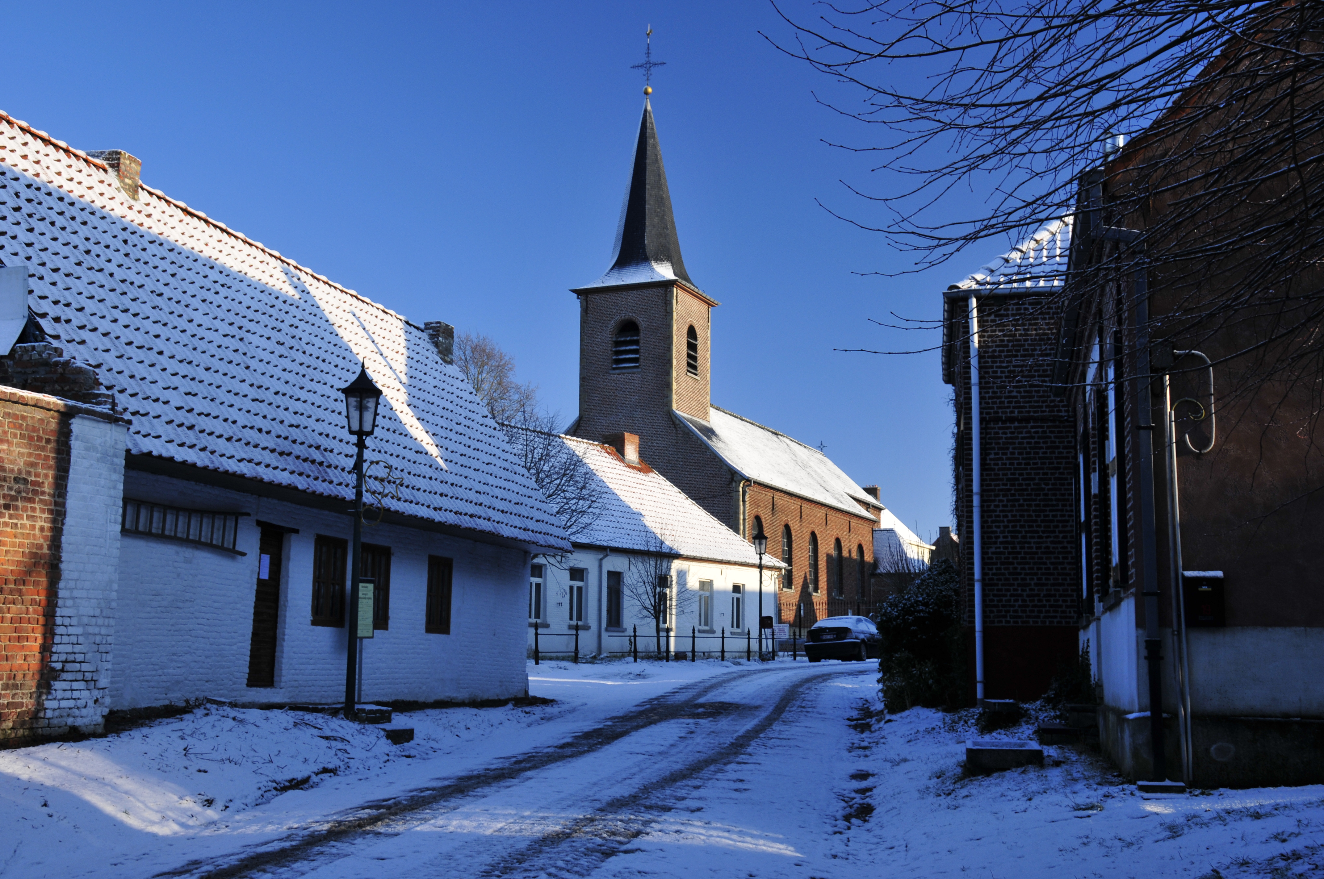 de Brouwerijstraat in de sneeuw met de St-Pieters-Banden kerk en de keramiekhoeve